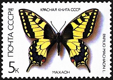 Почтовая марка СССР. Махаон. Номер в каталоге ЦФА 5800